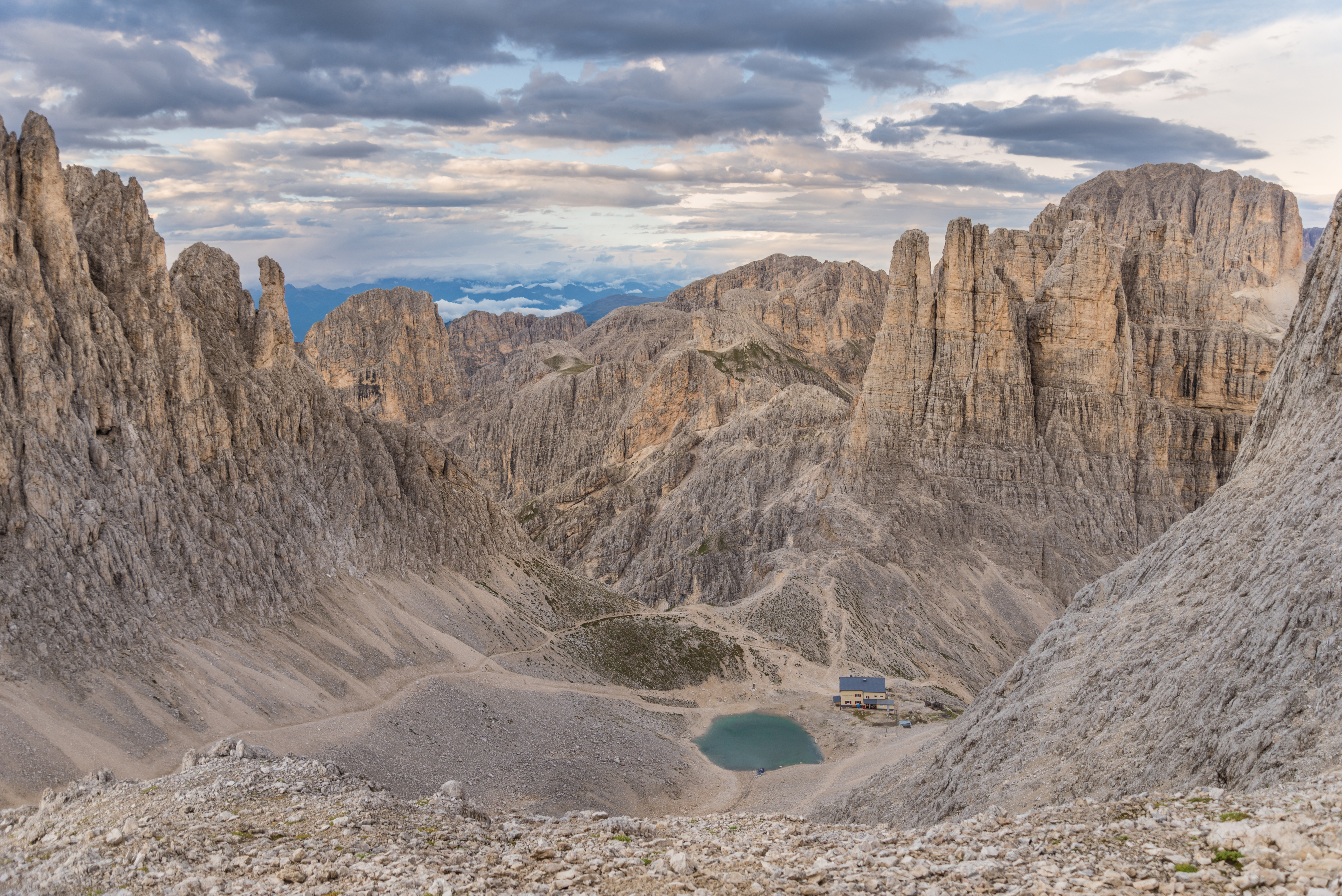 Parco naturale dello Sciliar-Catinaccio, Croda Di Re Laurino e Torri del Vajolet